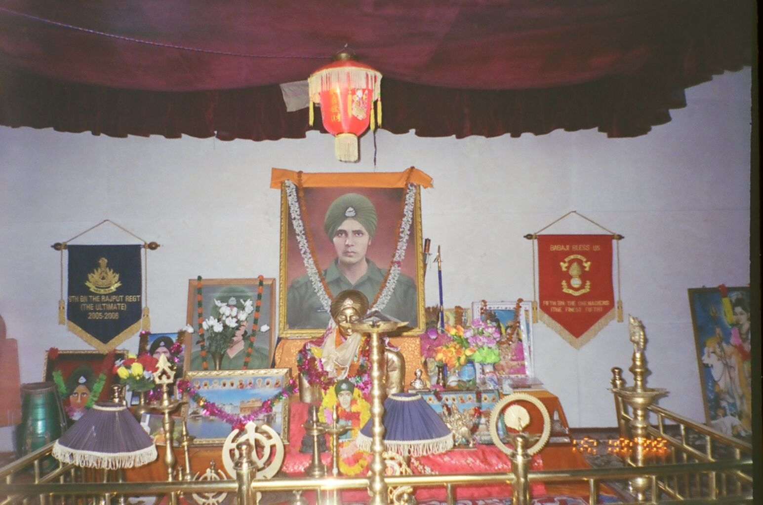 Temple of Baba Harbhajan Singh